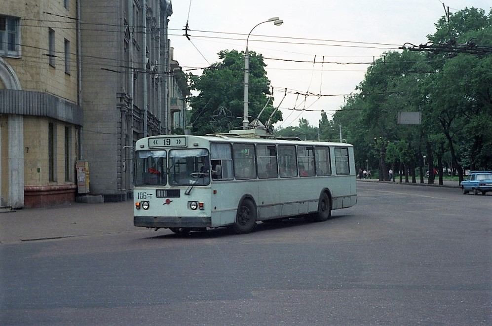 Воронежский троллейбус - маршрут №19